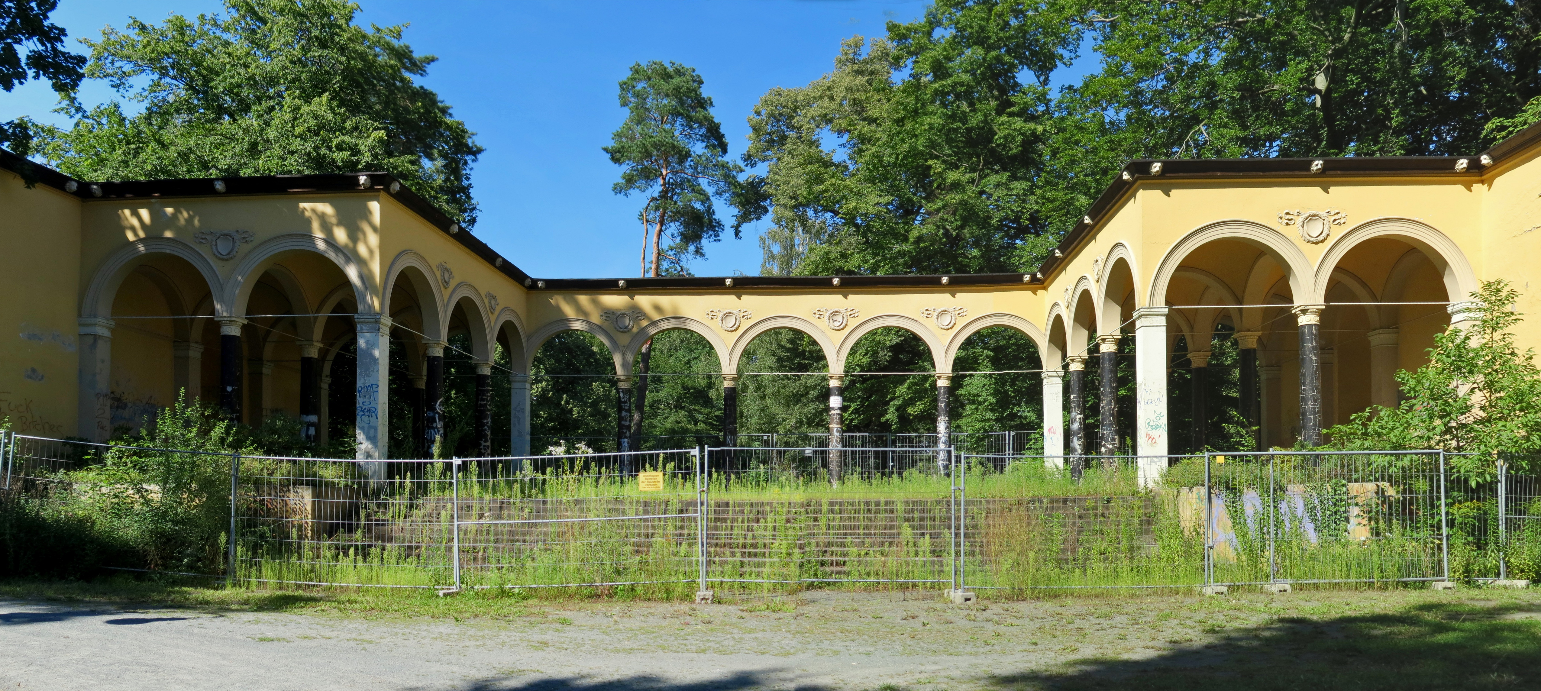 Ruhwaldpark - Arkade